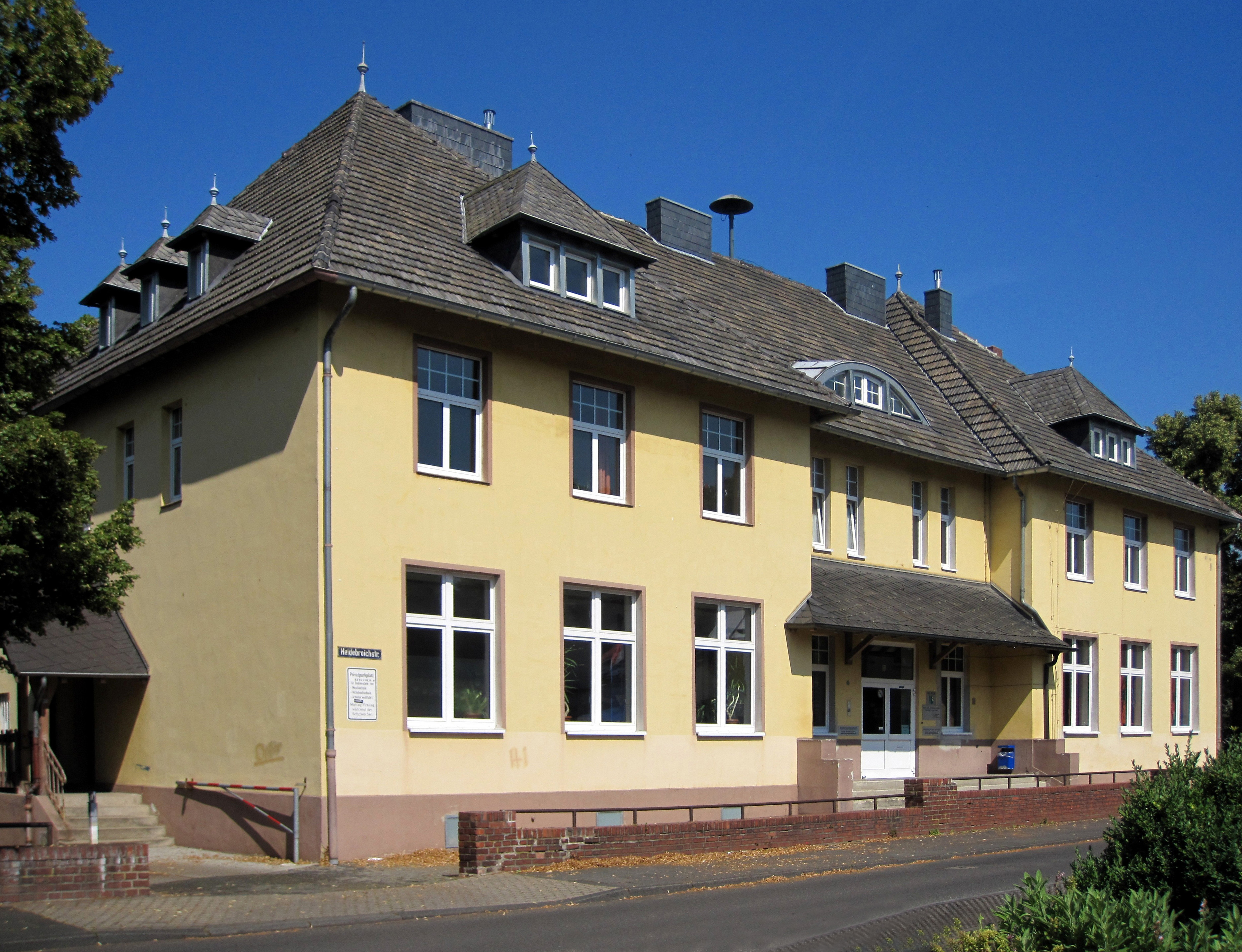 Liblar Heidebroicher Straße 36